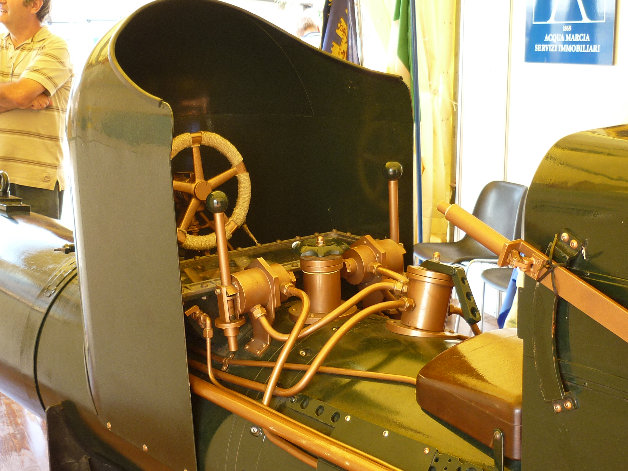 sommergibile biposto: epoca seconda guerra mondiale, incursori della Marina militare italiana posto di guida - soprannome (maiale)